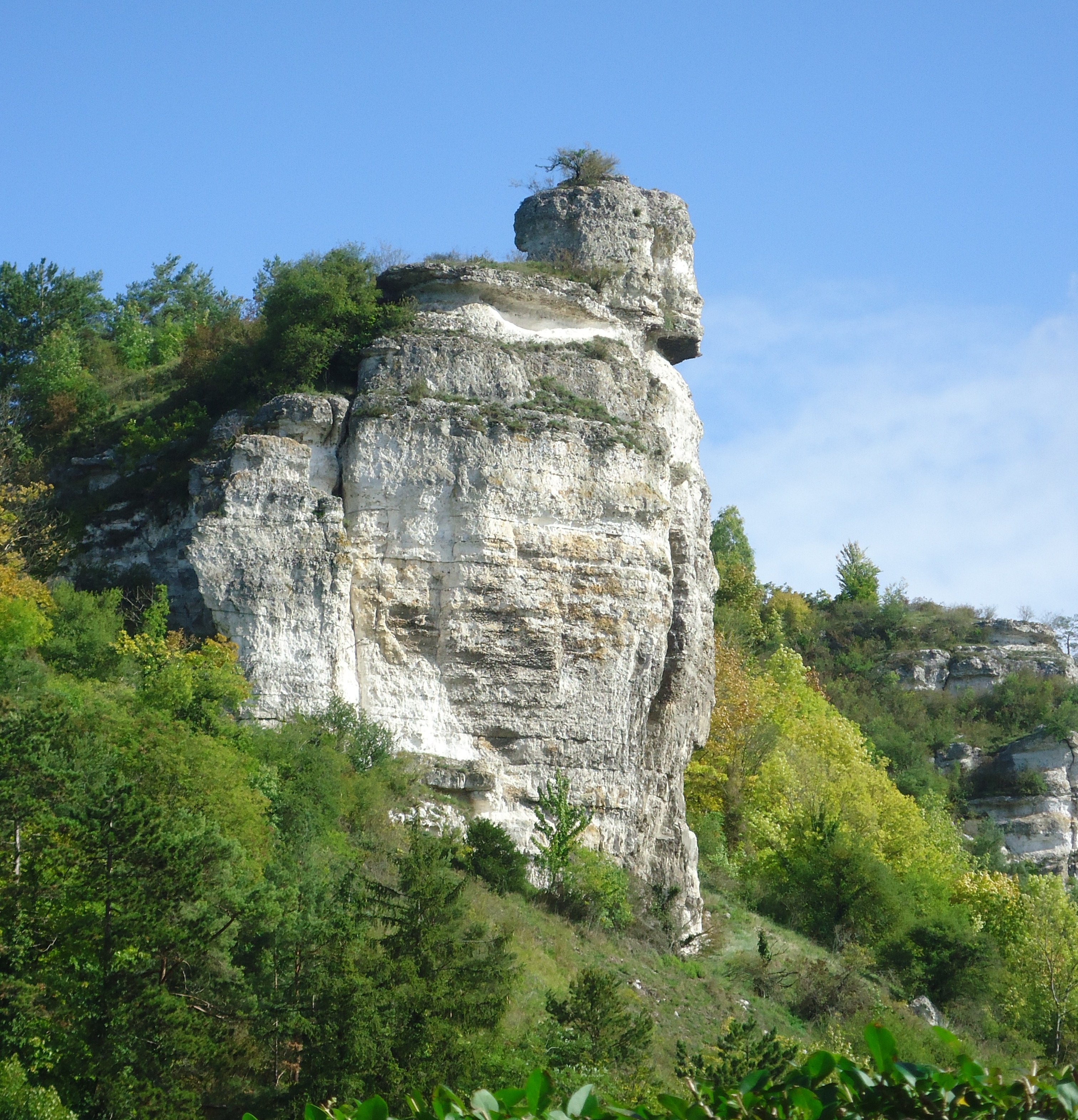 La roche à tête d'Homme - La Roquette - Eure (27)